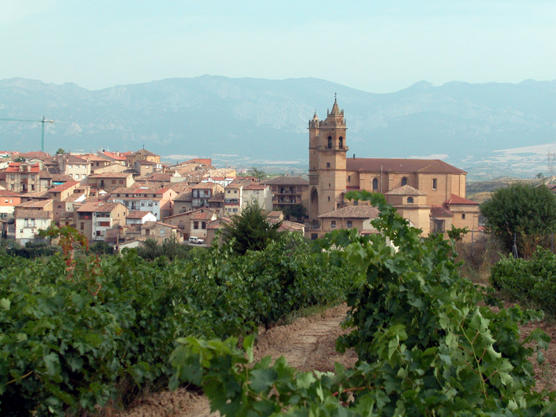 Vista de Elciego desde la carretera de Lapuebla, en Álava (España)